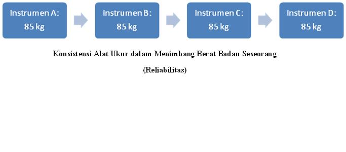 Deskripsi sederhana reliabilitas dalam statistik